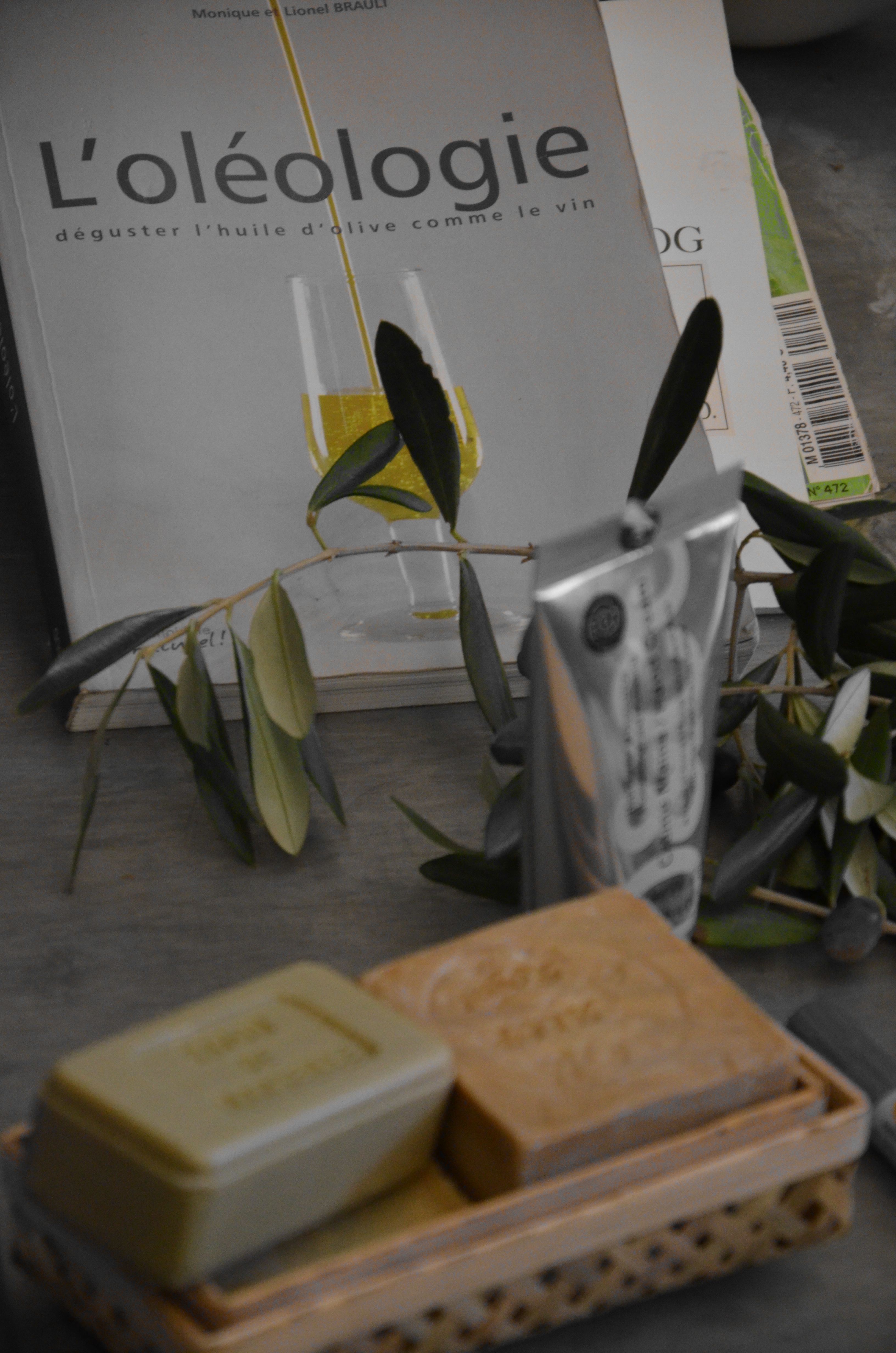 Oléologie à l'UESS de Forcalquier